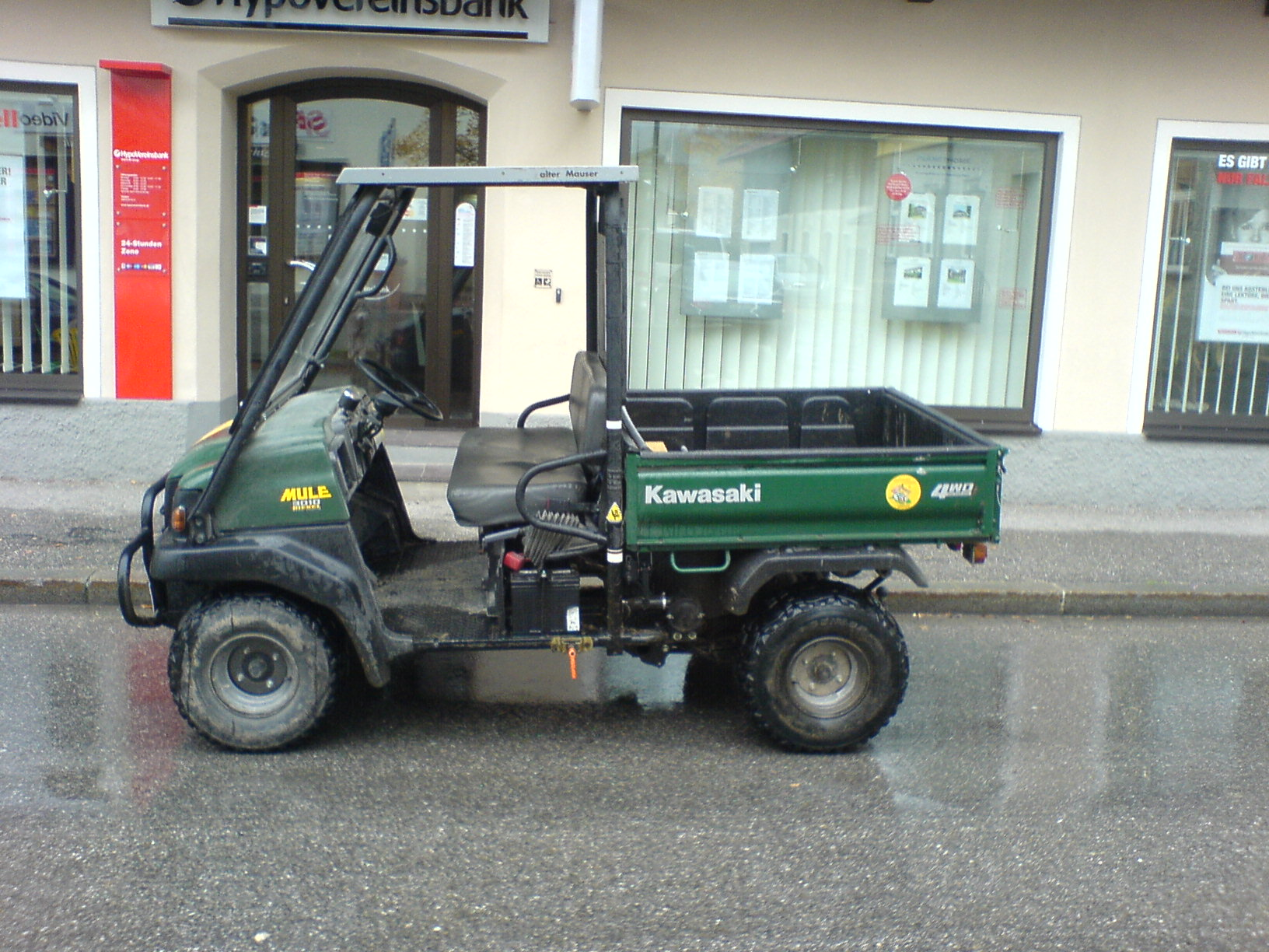 Kawasaki MULE™ 3010 Diesel